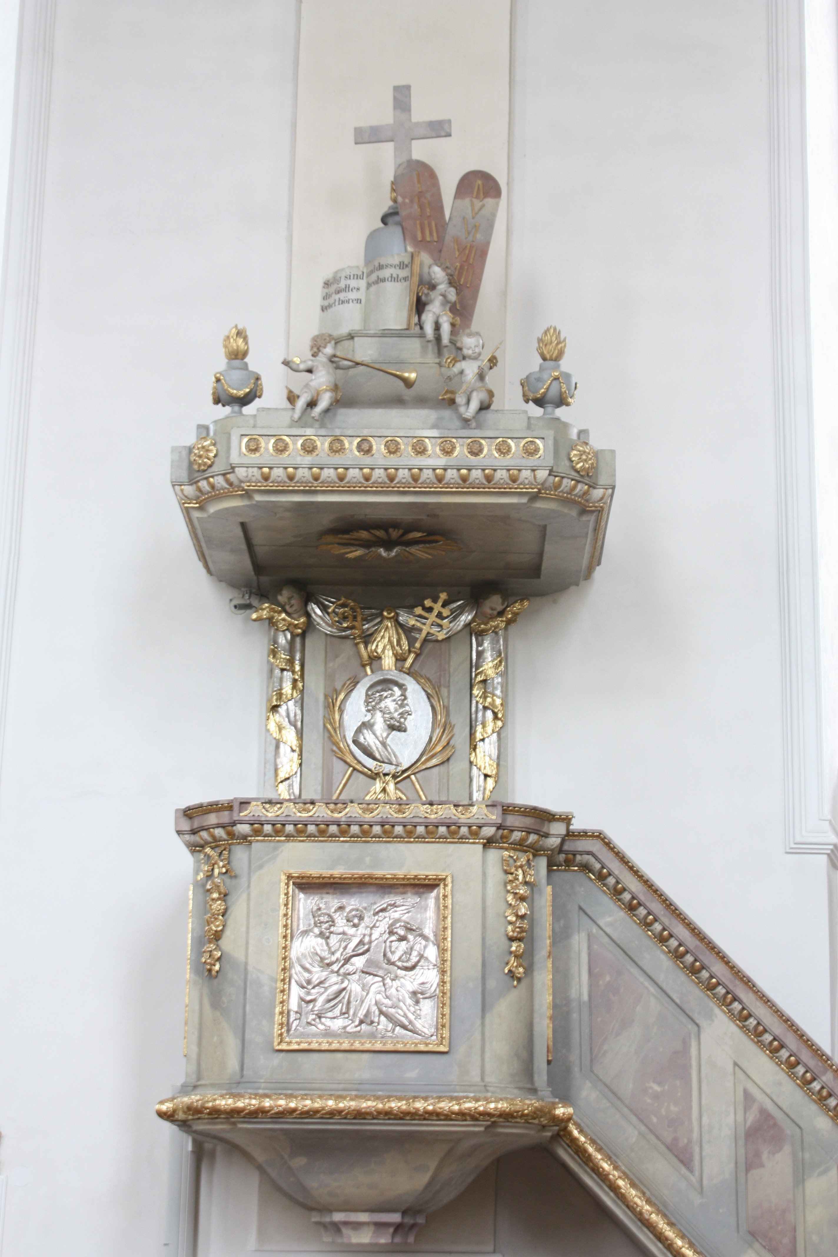 St. Michael, Kanzel v. Chr. Jorhan d. J., 1825